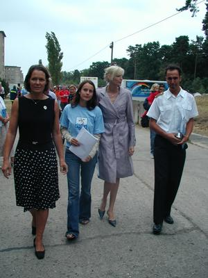 Christina Rau (links) auf Rügen. Nadja Auermann (zweite von rechts).